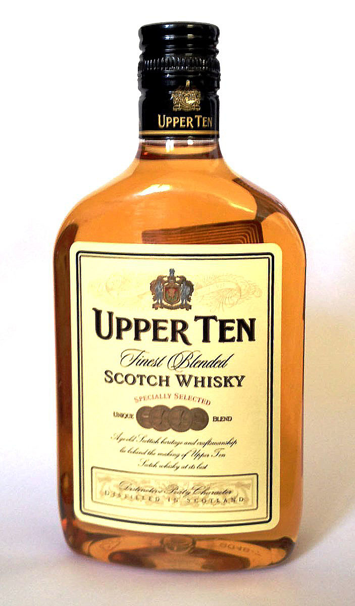 Upper Ten, norsk blended, basert på skotsk whisky